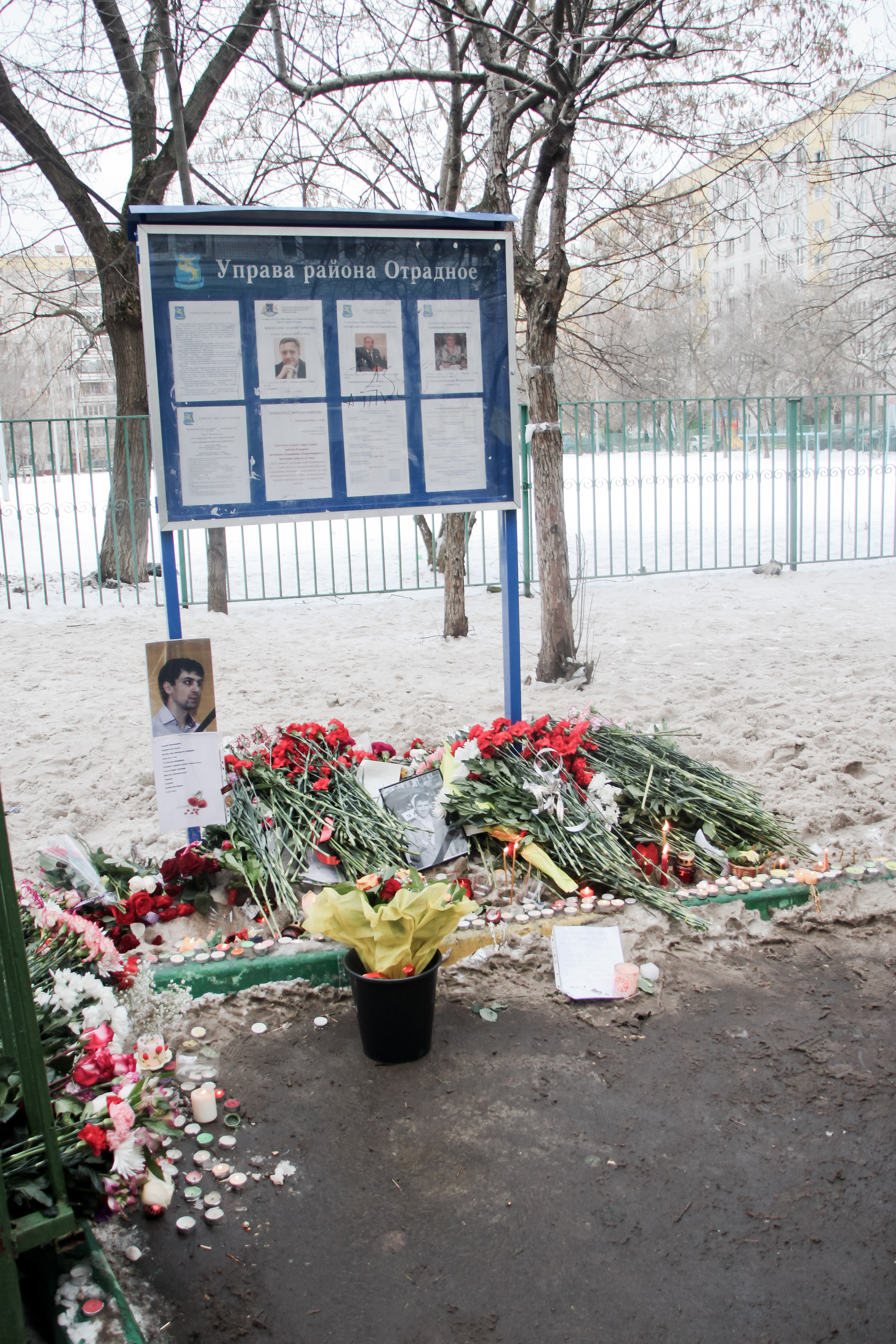 Московская средняя школа №263 на следующий день после инцидента с заложниками и стрельбой